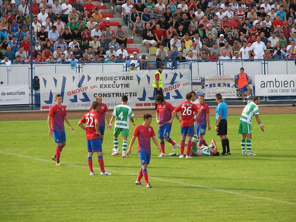 Vointa Sibiu vs Steaua, 1-1, 23 iulie 2011